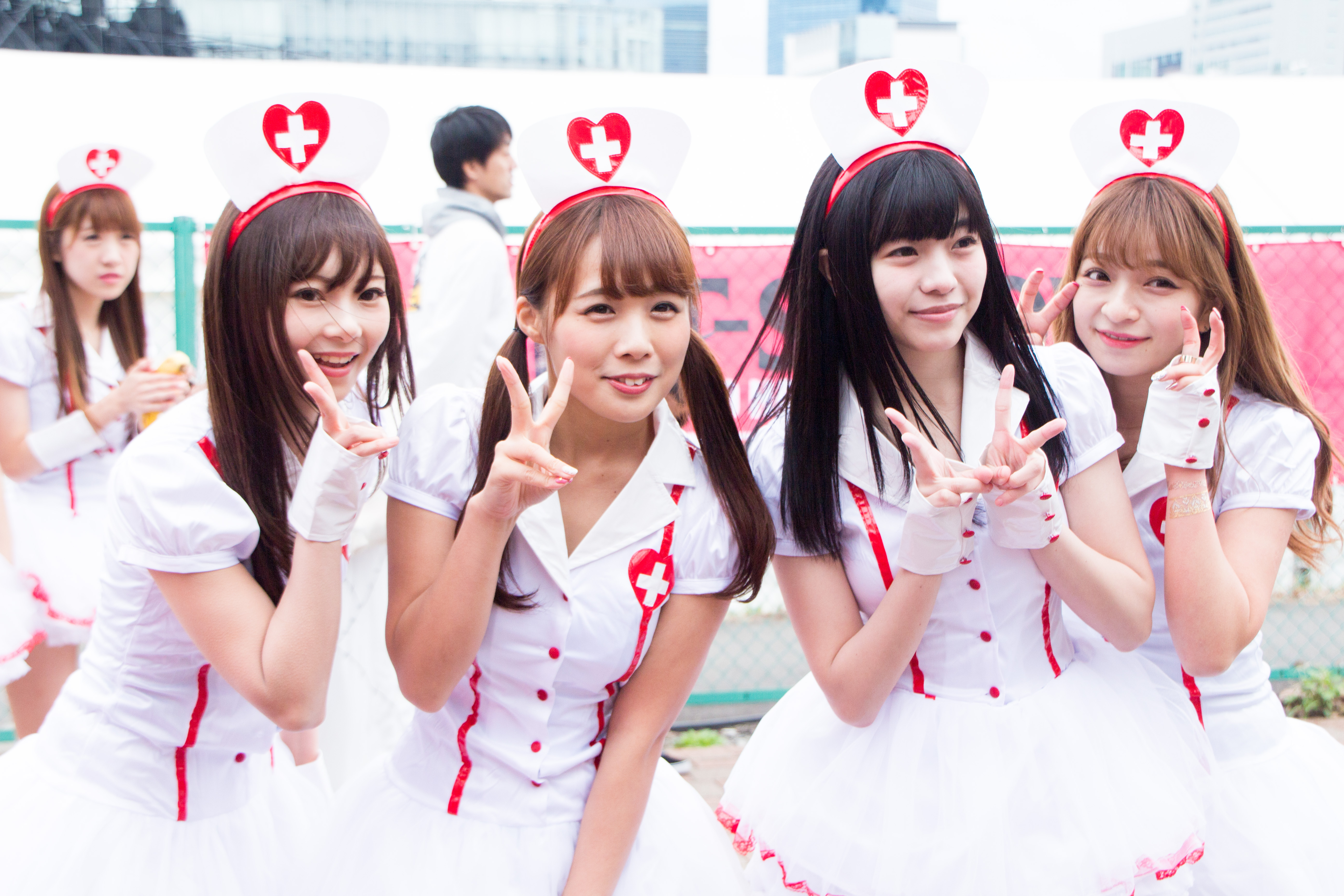 T-SPOOK 2016 計良日向子 船木沙織 田口未彩 石川夏海 宮谷優恵 荒川優那 (アキシブproject)